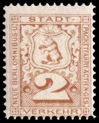 2 Pfennig-Briefmarke der Berliner Packetfahrt Gesellschaft von 1888